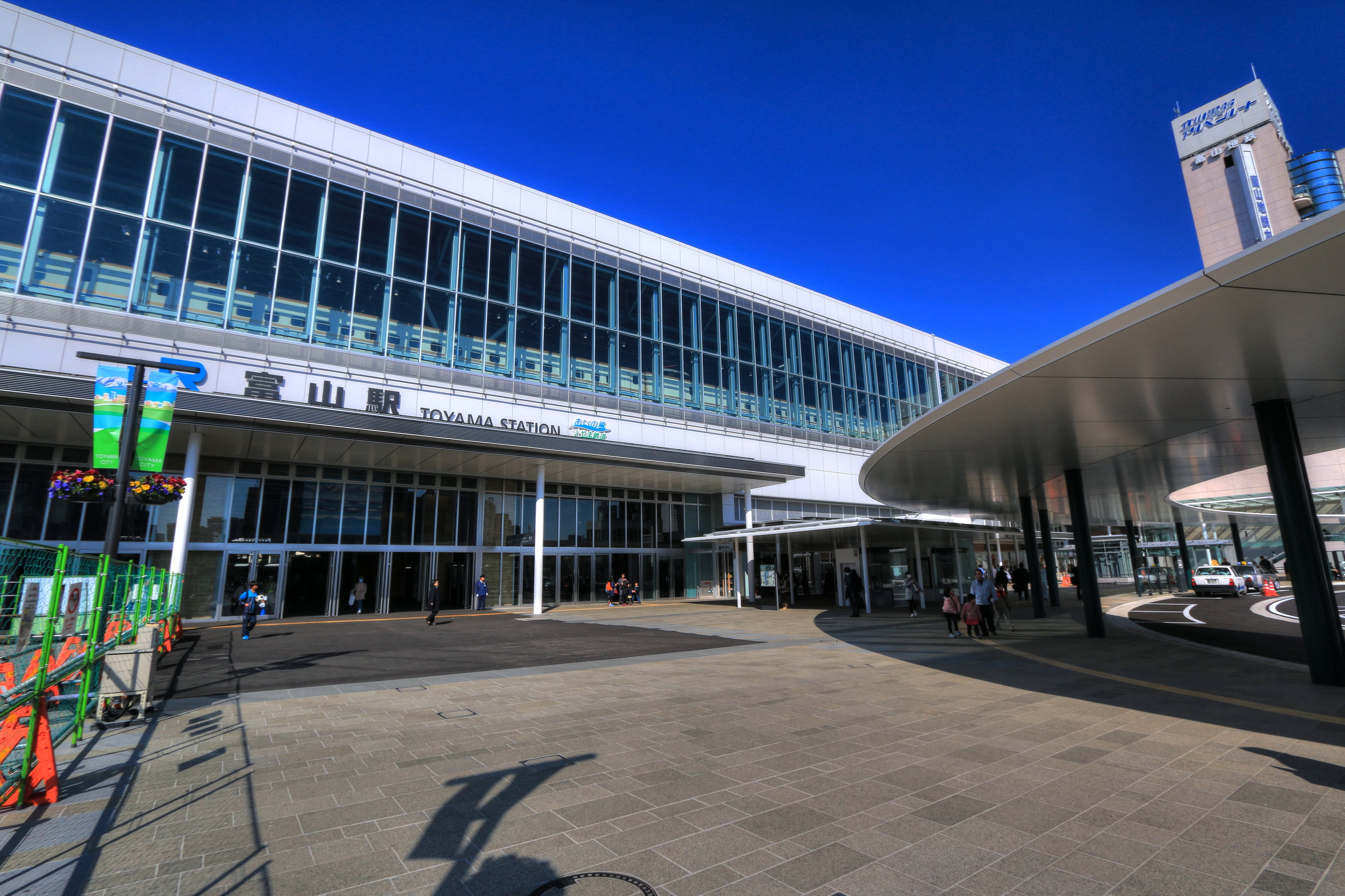 富山県富山市、富山駅、北陸新幹線、高山本線、あいの風とやま鉄道 Canon EOS 70D